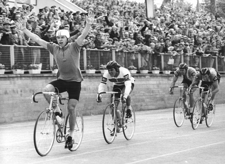 Schmeißer, Sahtob, Bartonicek, Moravec ADN-ZB Reiche 16.5.77-str Dresden: 30. Internationale Friedensfahrt - 9. Etappe Cottbus–Dresden über 149 km. Den zweiten DDR-Etappensieg konnten Dresdens Radsportfreunde bei der Jubiläumsfahrt im Steyer-Stadion feiern. Noch auf der Stadionsrunde konnte Siegbert Schmeißer (l.) den kubanischen Ausreißer Lazaro Sahtob (2.v.l.), der Zweiter wurde, und seinen englischen Begleiter Jones überspurten. Dritter wurde Antonin Bartonicek (CSSR,r.) vor seinem Landsmann Vlastimil Moravec.